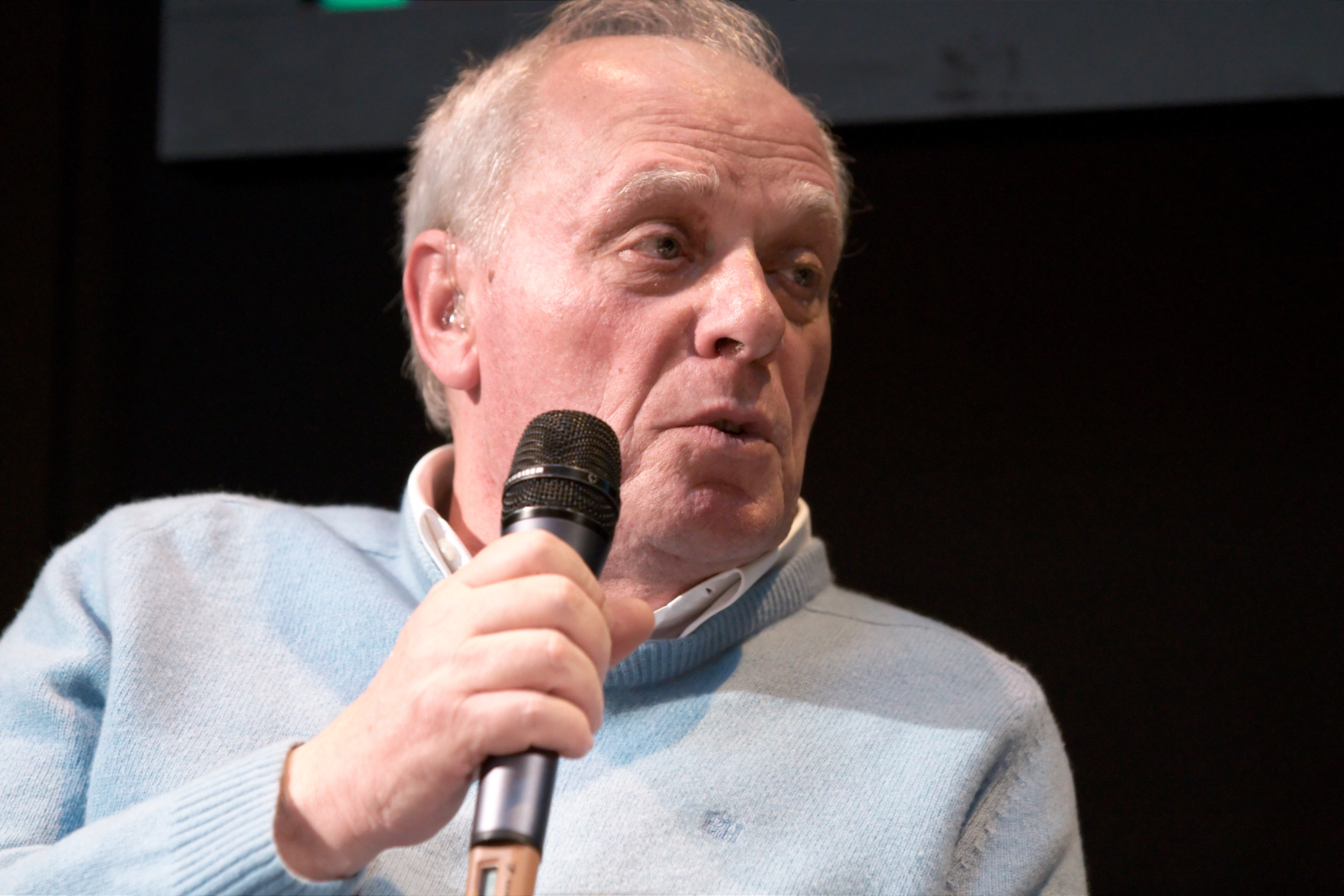 António Lobo Antunes au Salon du livre de Paris lors d'un tête-à-tête avec Jean d'Ormesson.